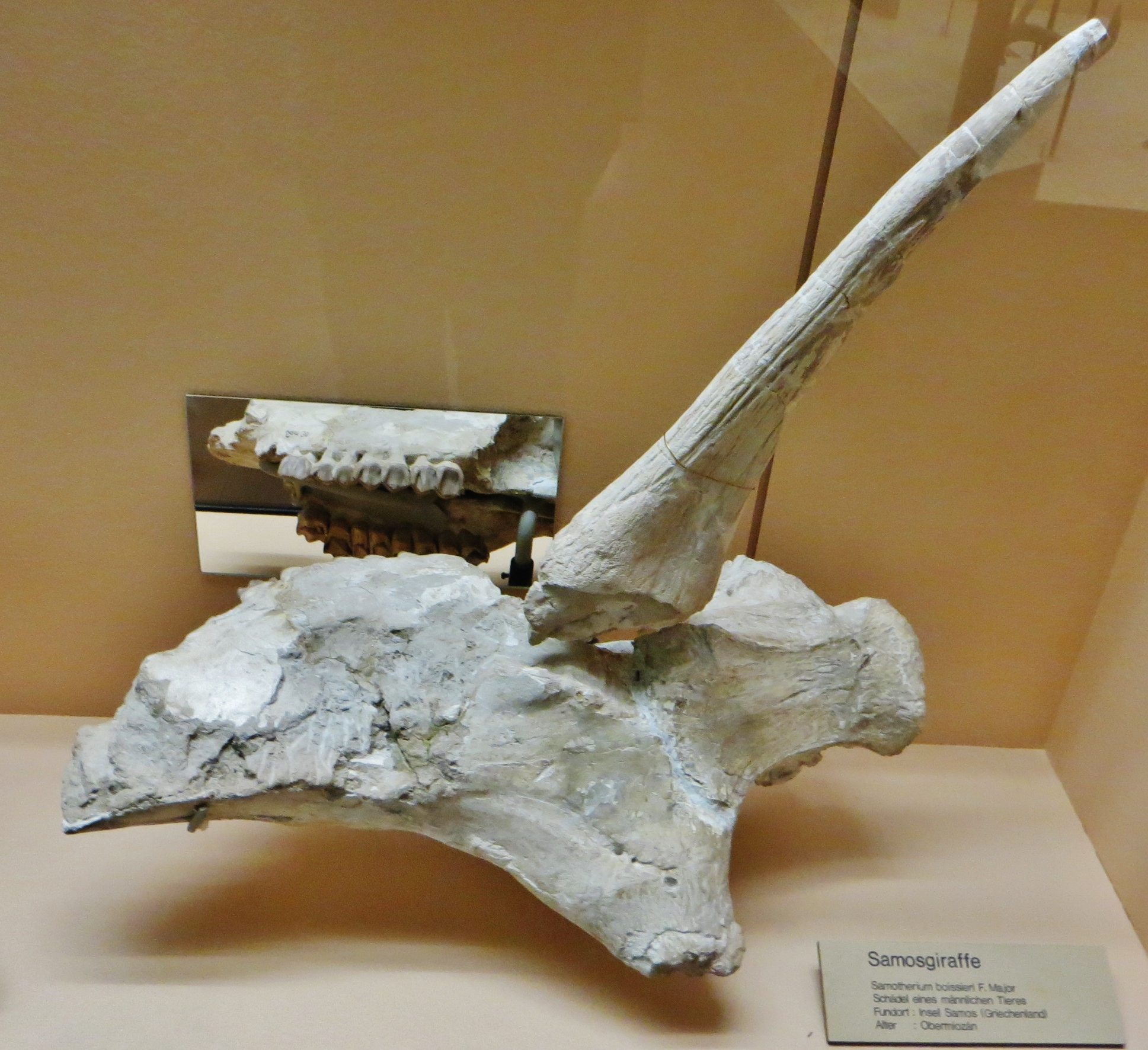 Fossil of Samotherium - Took the picture at Natural History Museum, Basel